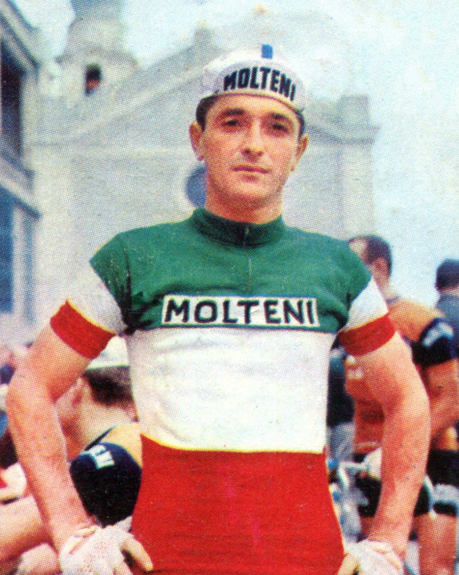 CAMPIONI DELLO SPORT 1966/67 - Figurina/Sticker n. 190 - M. DANCELLI -Rec